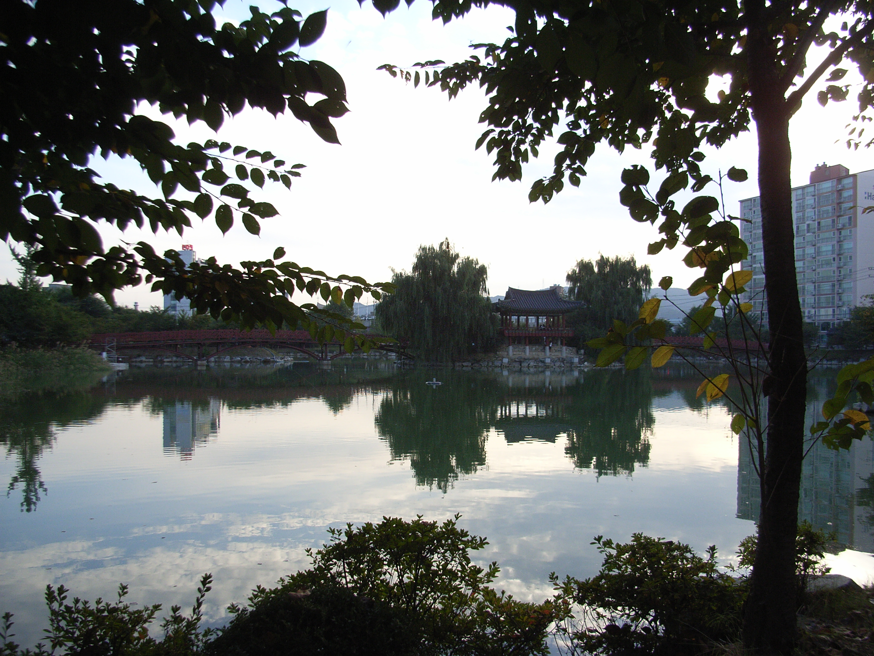 水面に綺麗に映っている。